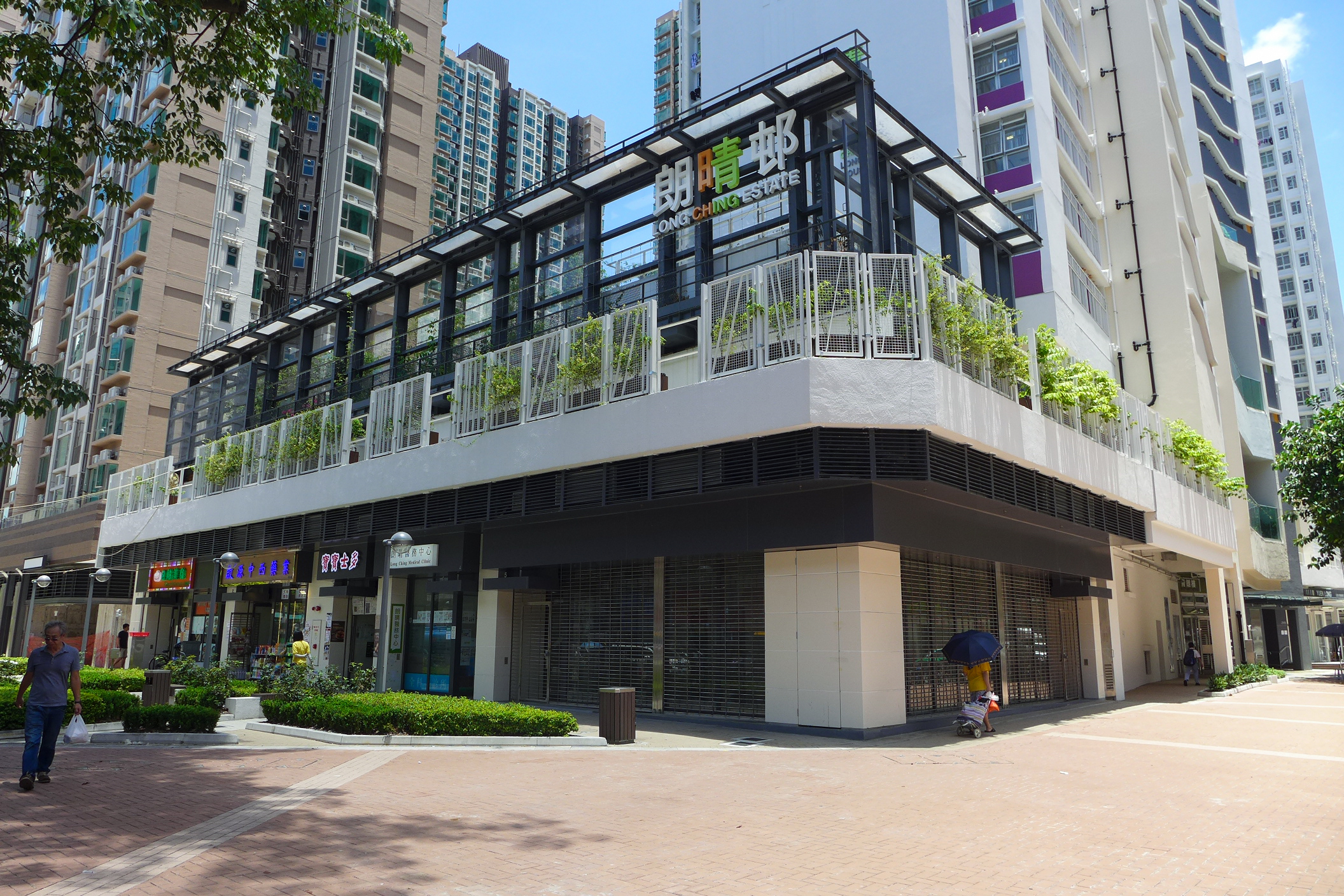 Long Ching Estate